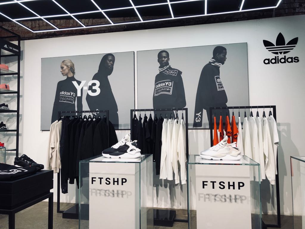 Instalace zaměřená na prodej značky Y-3